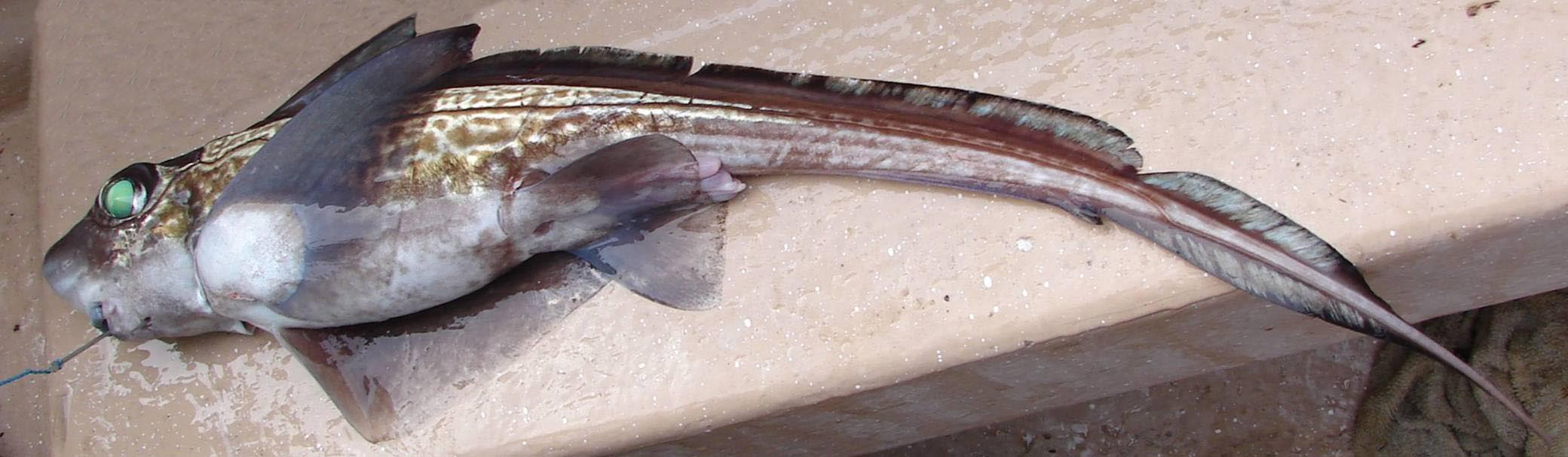 Chimaera monstrosa .This is from fishing in the Sognefjord. They live there from 200 to 1000 m depth. Norwegian: Havmus, i Sogn kalla Haogjydling.Denne er fiska i Sognefjorden med djupnaline (brosmeline) på fleire hundre meters djup.Det er nokså vanleg å få eit par når ein set line.